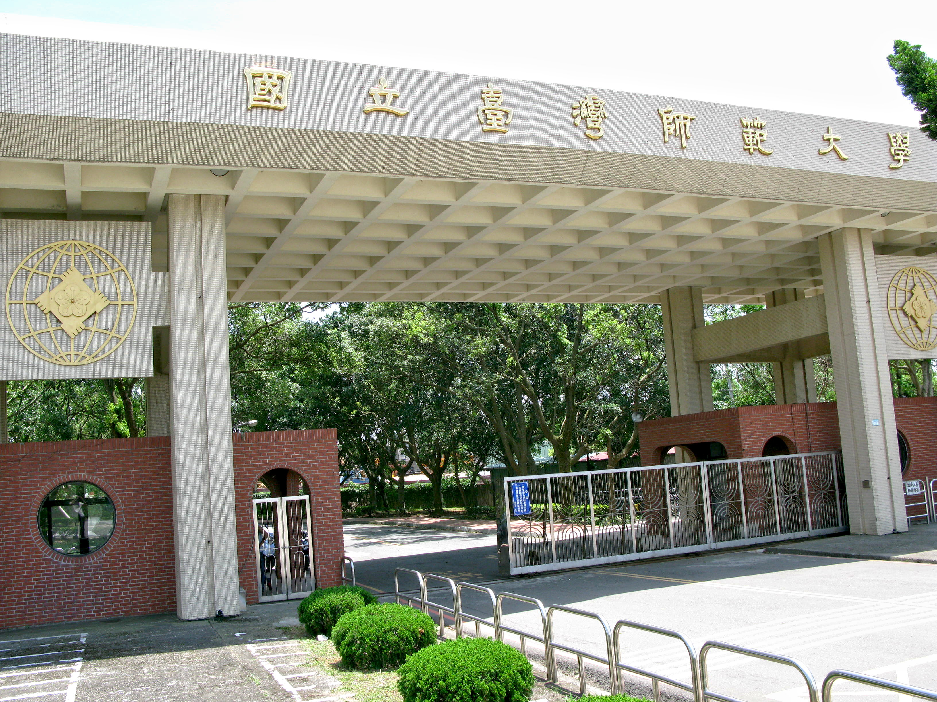 中文（台灣）: 國立臺灣師範大學林口校區大門。